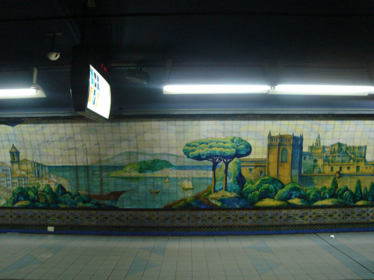 Mural en el andén a Constitución de la estación Mariano Moreno de la línea C del subte porteño.